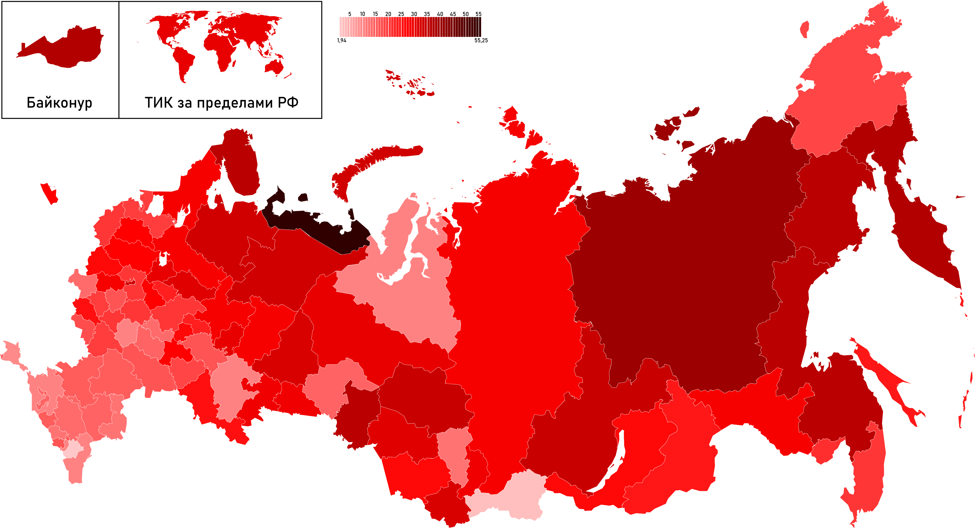 Карта результатов «Нет» по субъектам федерации